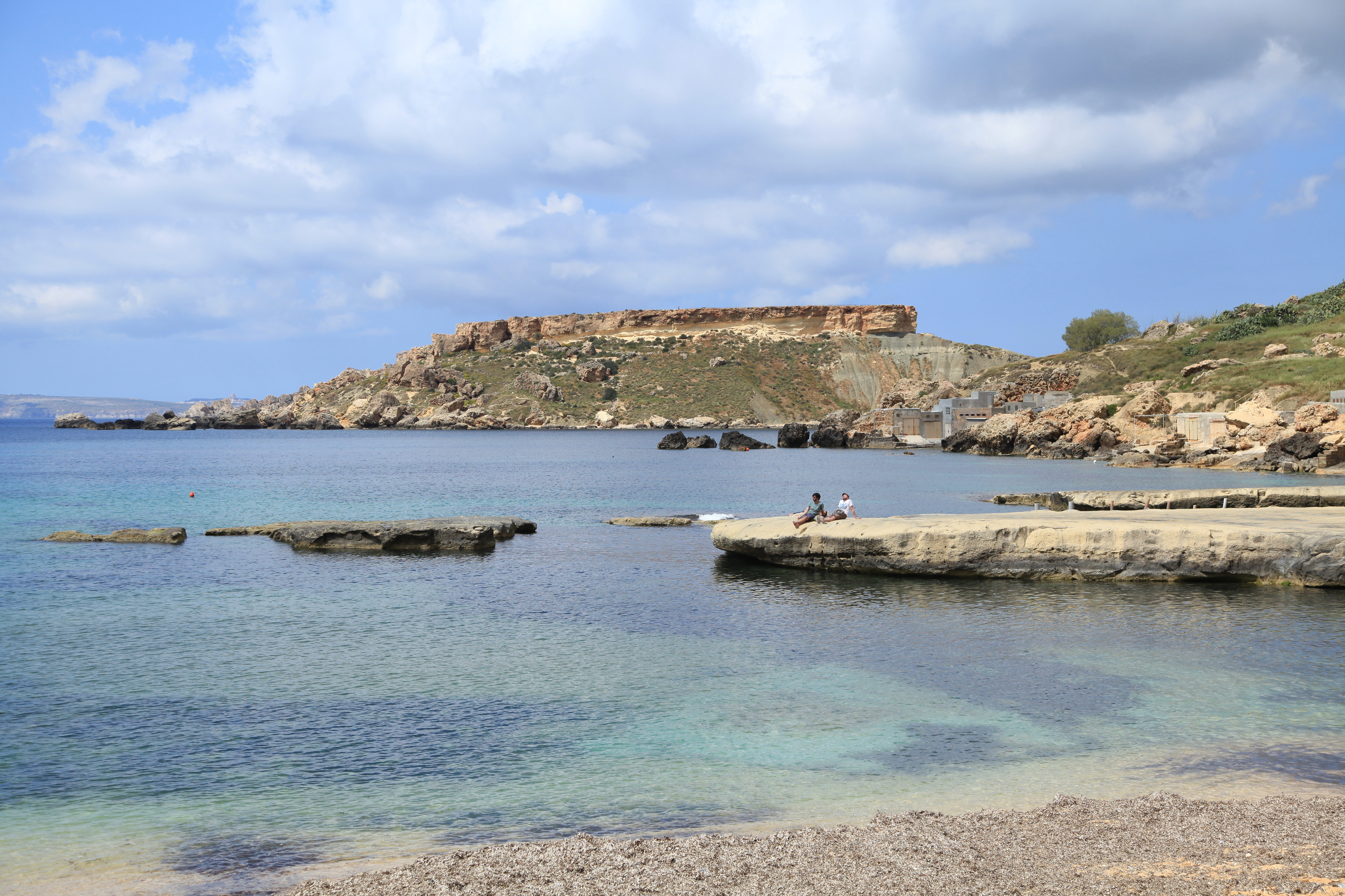 Ġnejna Bay and Il-Karraba peninsula in Mġarr, Malta